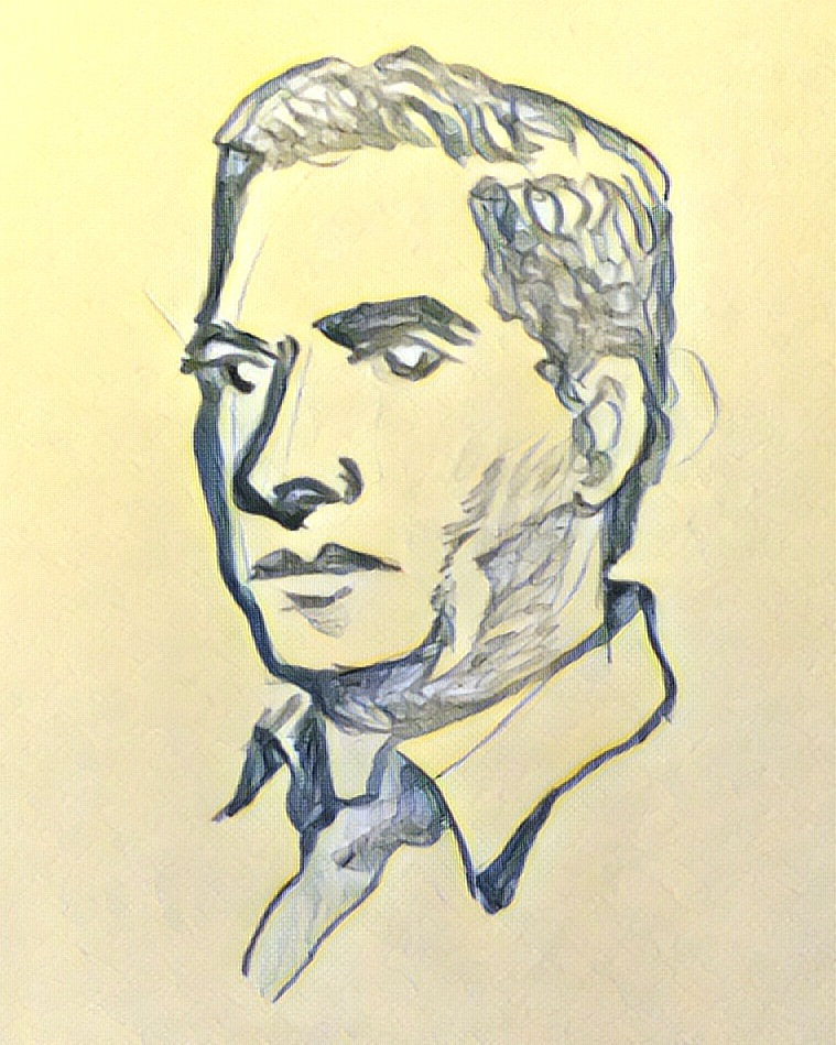 Xesús Manuel Lorenzo Varela Vázquez, escritor e poeta galego.